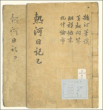 朴趾源作、熱河日記